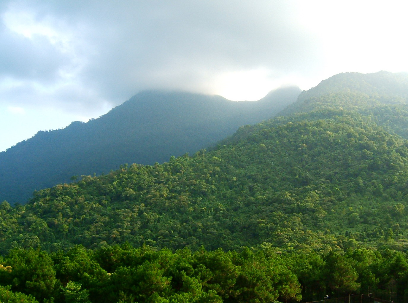 Một phần của Vườn Quốc gia Ba Vì